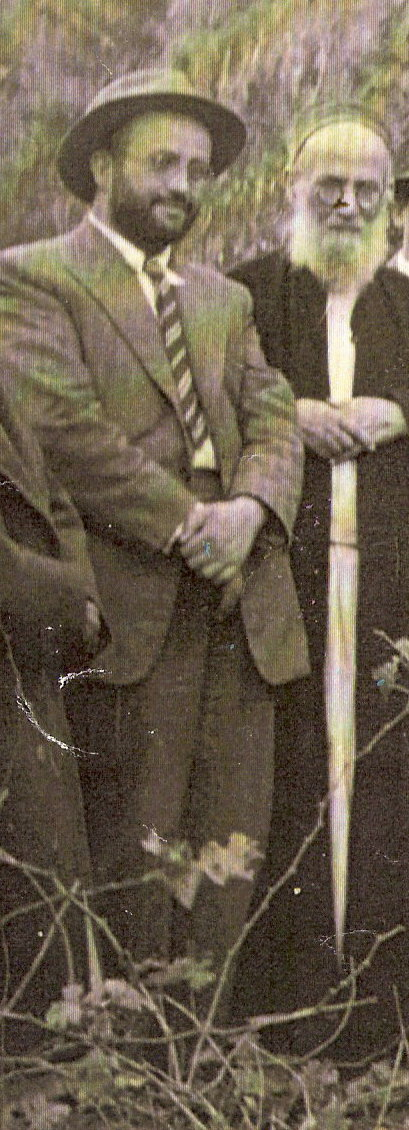 הרב ניסים דוד עזראן ואביו